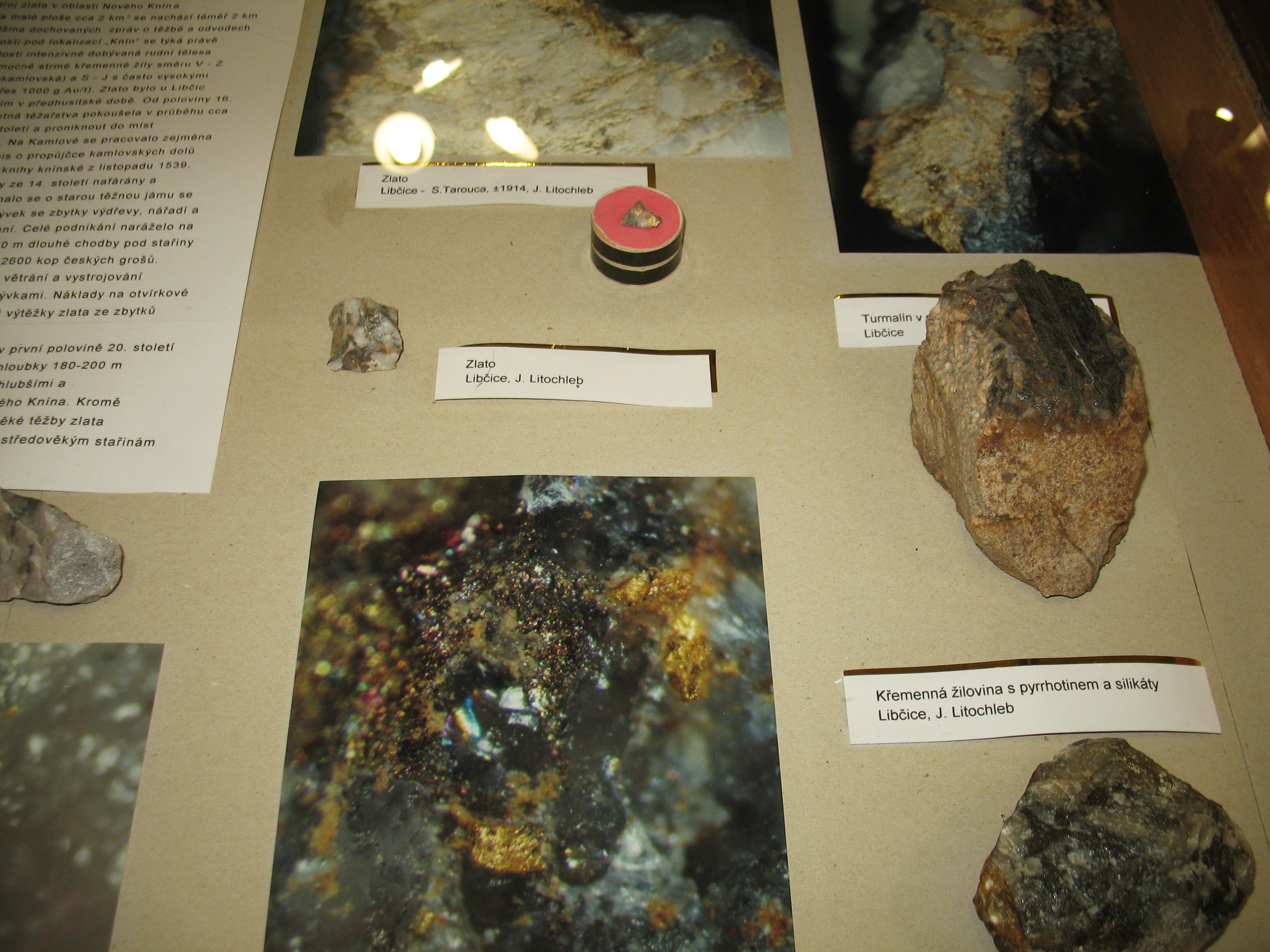 Vzorky zlata ze sbírek RNDr. Jiřího Litochleba